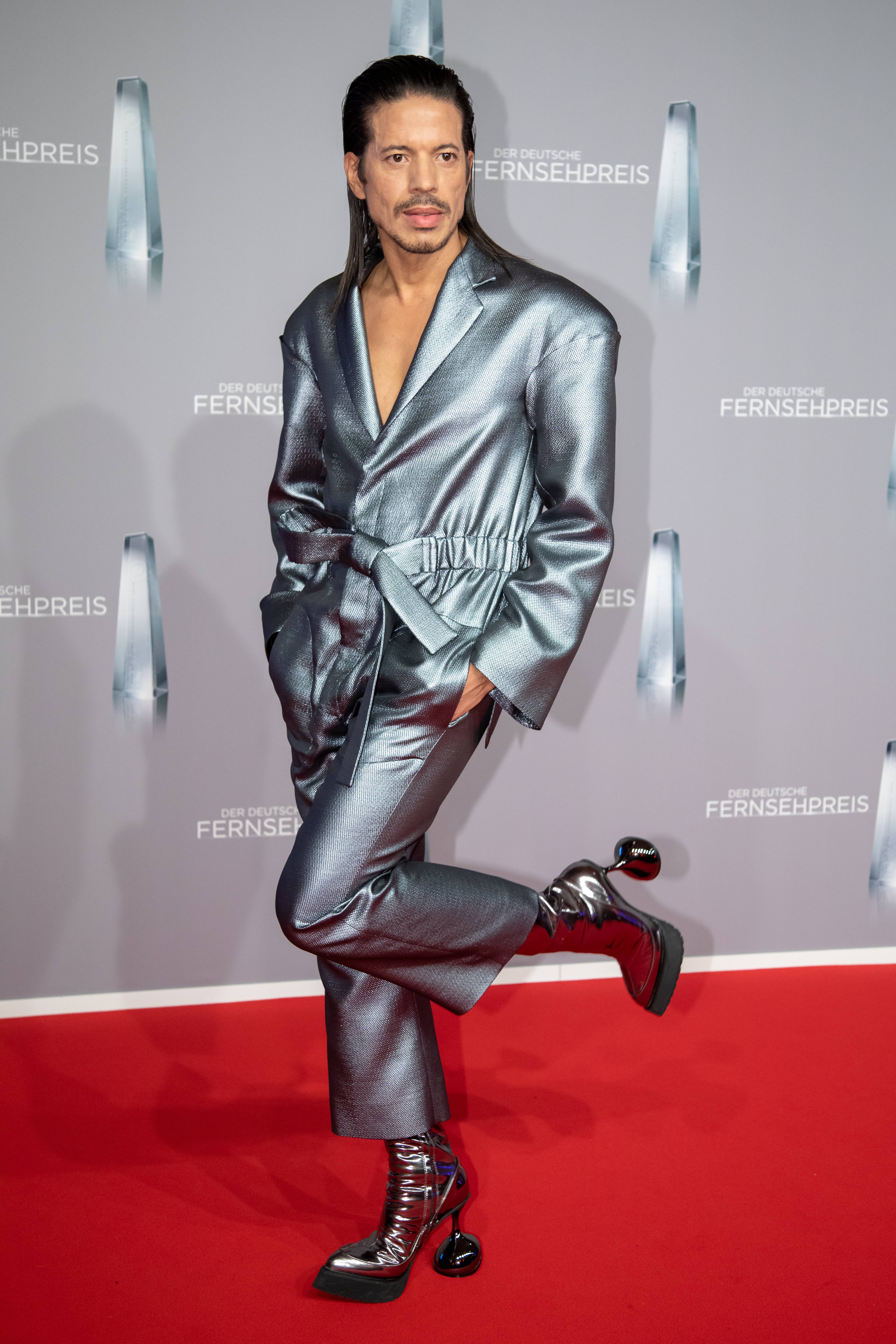 Jorge González beim Deutschen Fernsehpreis 2019 in der Düsseldorfer Rheinterrasse